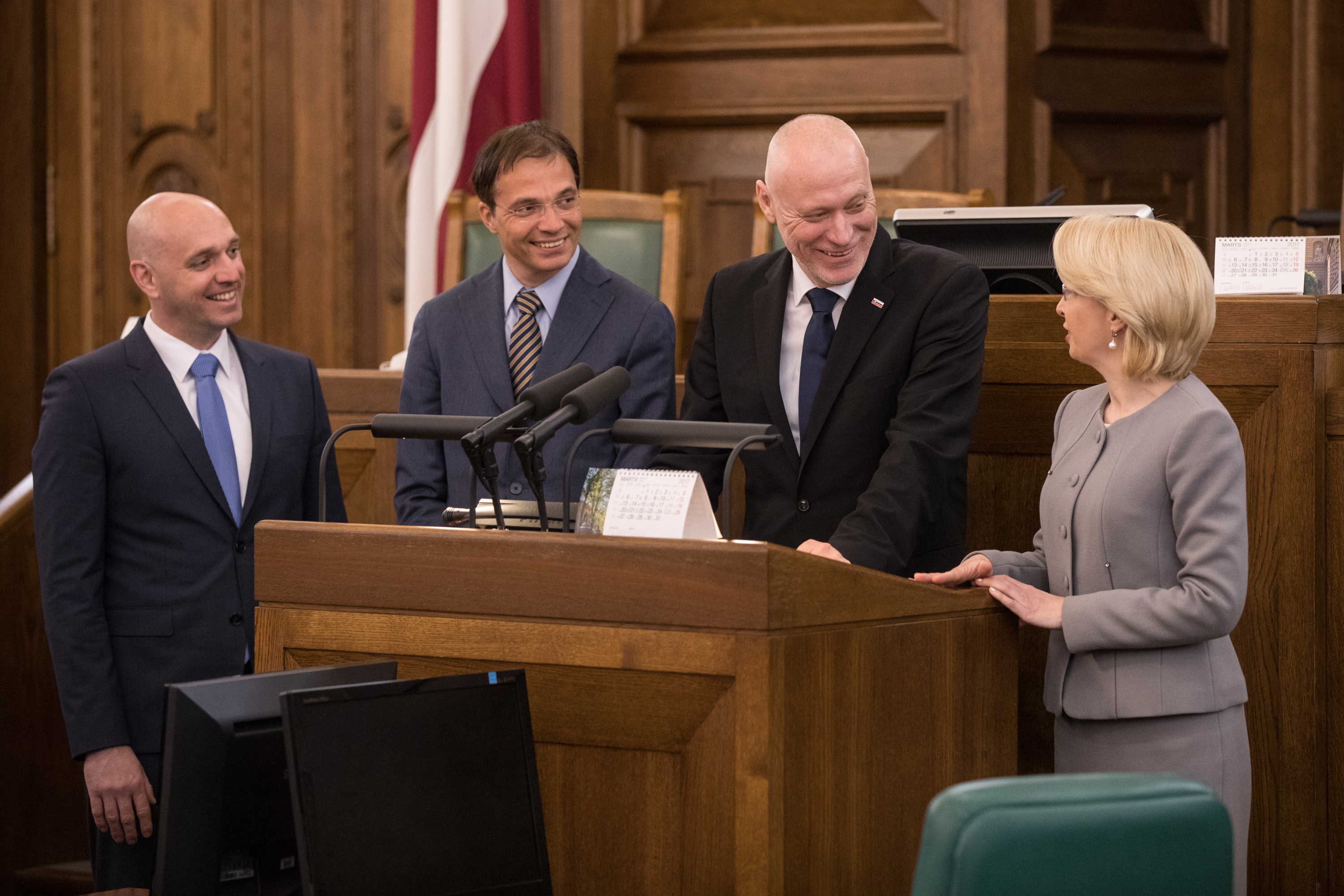 2017.gada 28.marts. Saeimas priekšsēdētāja Ināra Mūrniece tiekas ar Slovēnijas Republikas Nacionālās asamblejas prezidentu Dr.Milanu Brglezu (Milan Brglez). Foto: Ernests Dinka, Saeimas Administrācija Izmantošanas noteikumi: saeima.lv/lv/autortiesibas